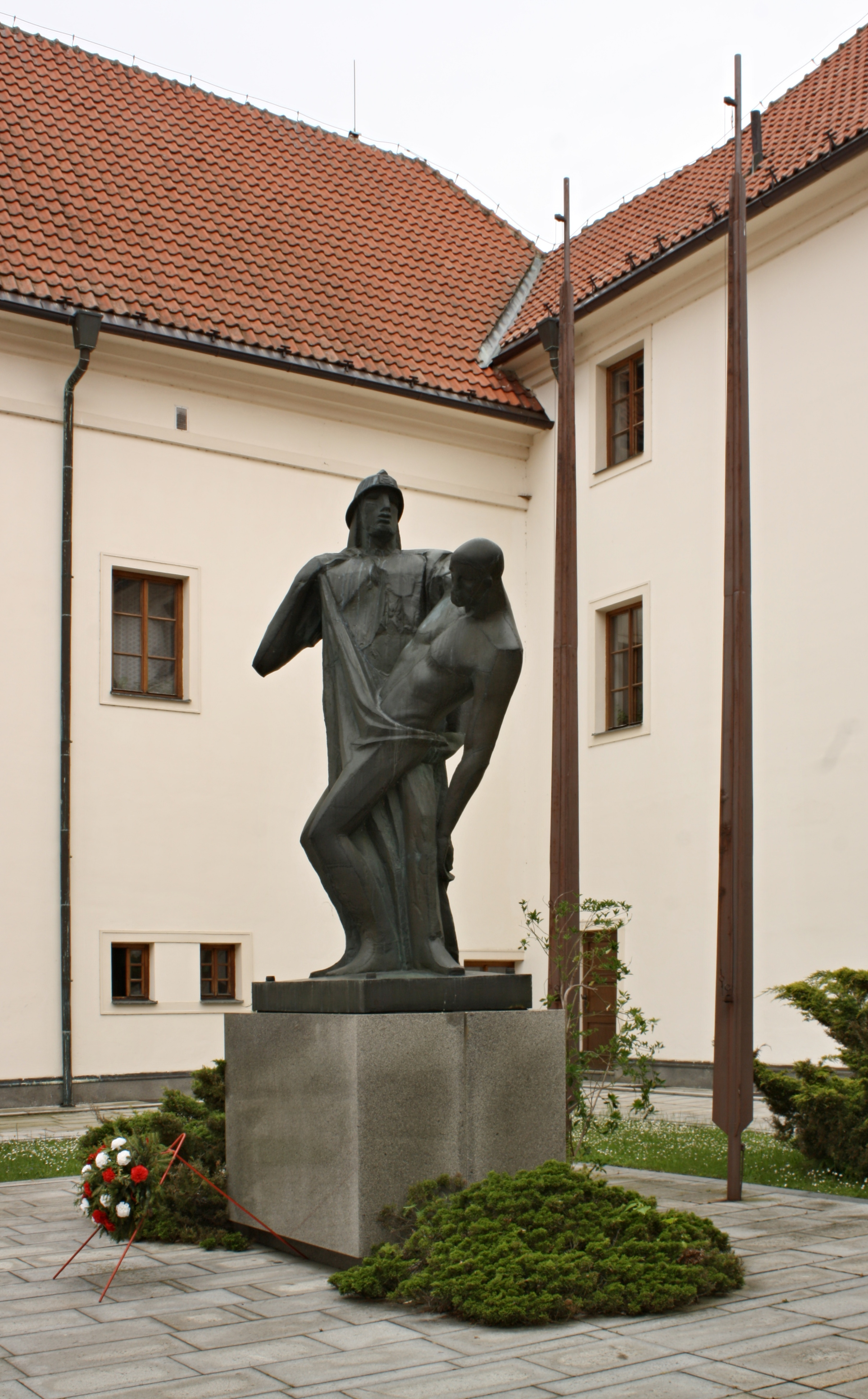 Přibyslav, zámek, nádvoří s pomníkem.